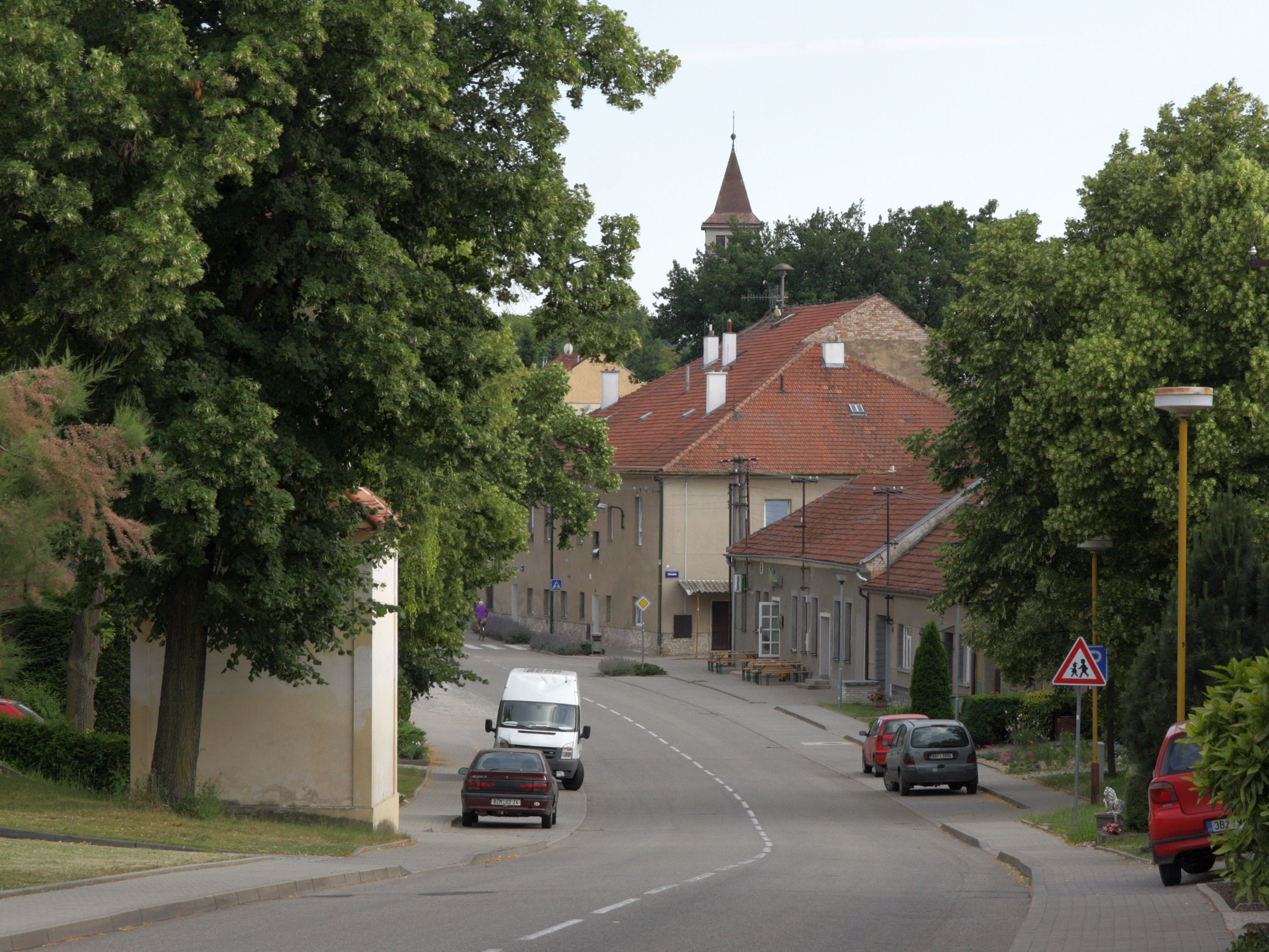 Blažovice - náves od severu.